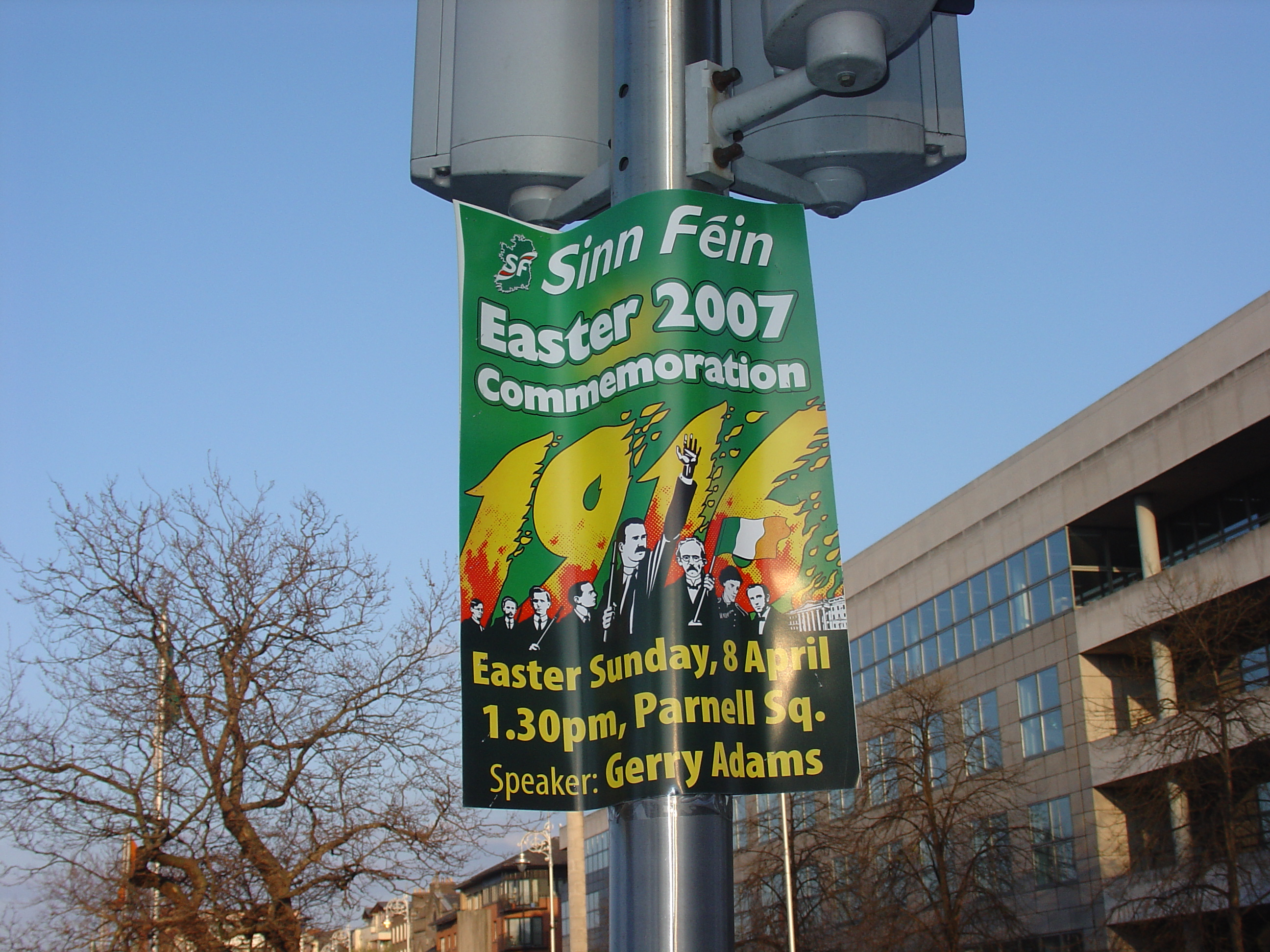 Sinn Féin Poster